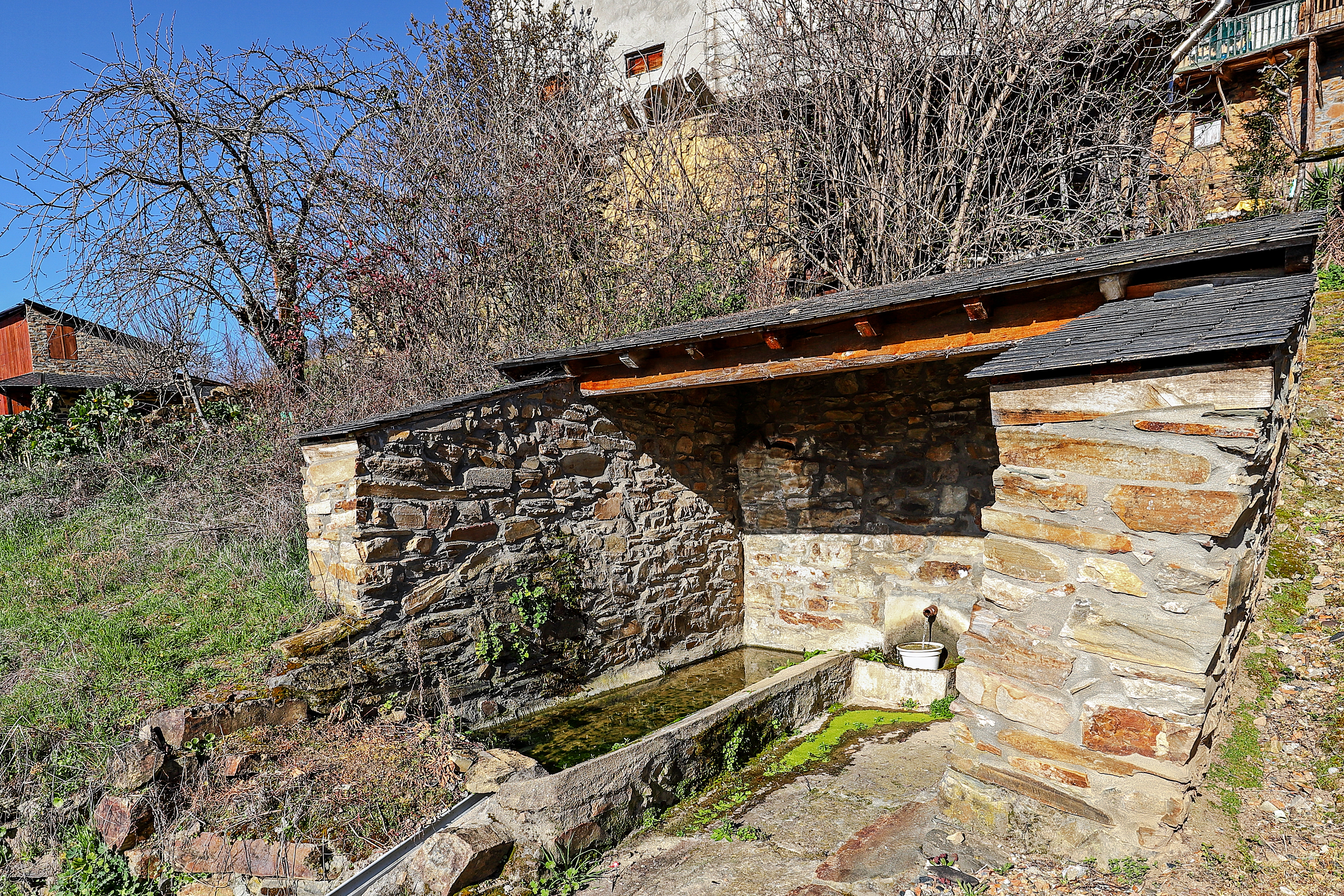 Landoiro es una localidad del municipio de Villafranca del Bierzo, en la comarca de El Bierzo, provincia de León.